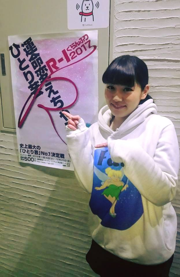 Kittan。日本のお笑いタレント。